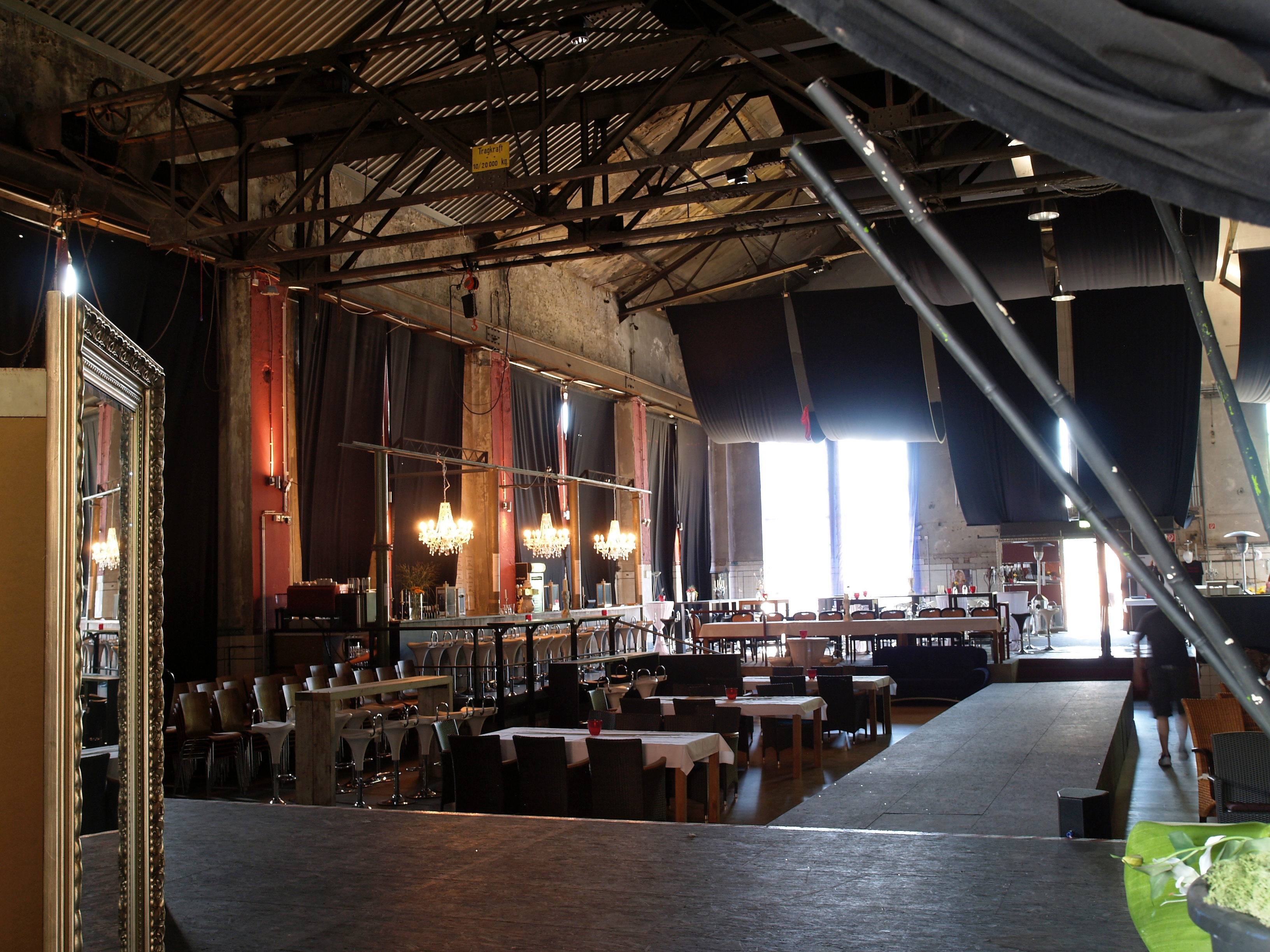 RevuePalast Ruhr in der ehemaligen Heizzentrale der Zeche Ewald in Herten, Aufnahme von der Bühne in den Saal, tagsüber ohne Vorstellung.